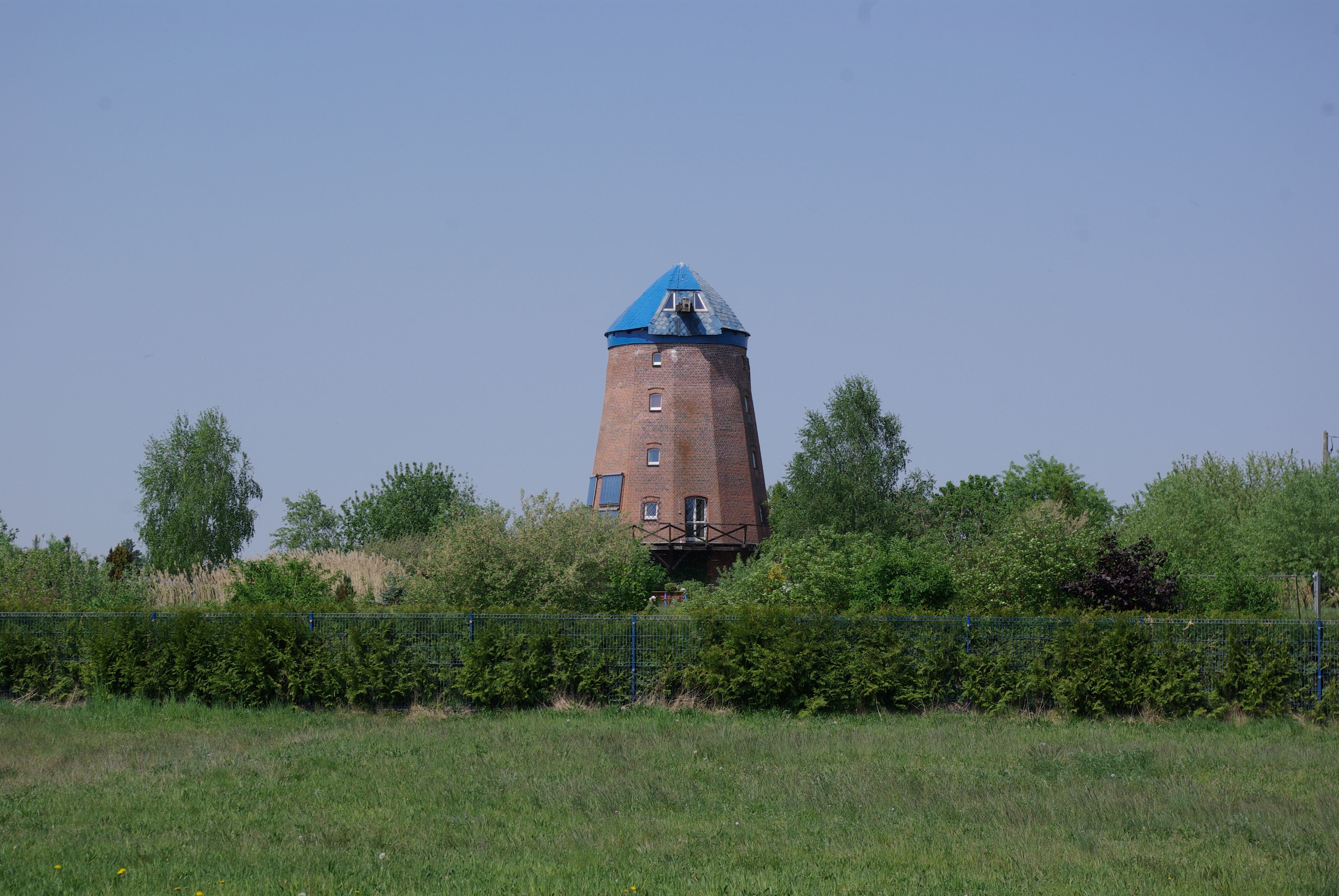 Märkiche Heide in Brandenburg. Die Mühle im Ortsteil Groß Leine steht unter Denkmalschutz.